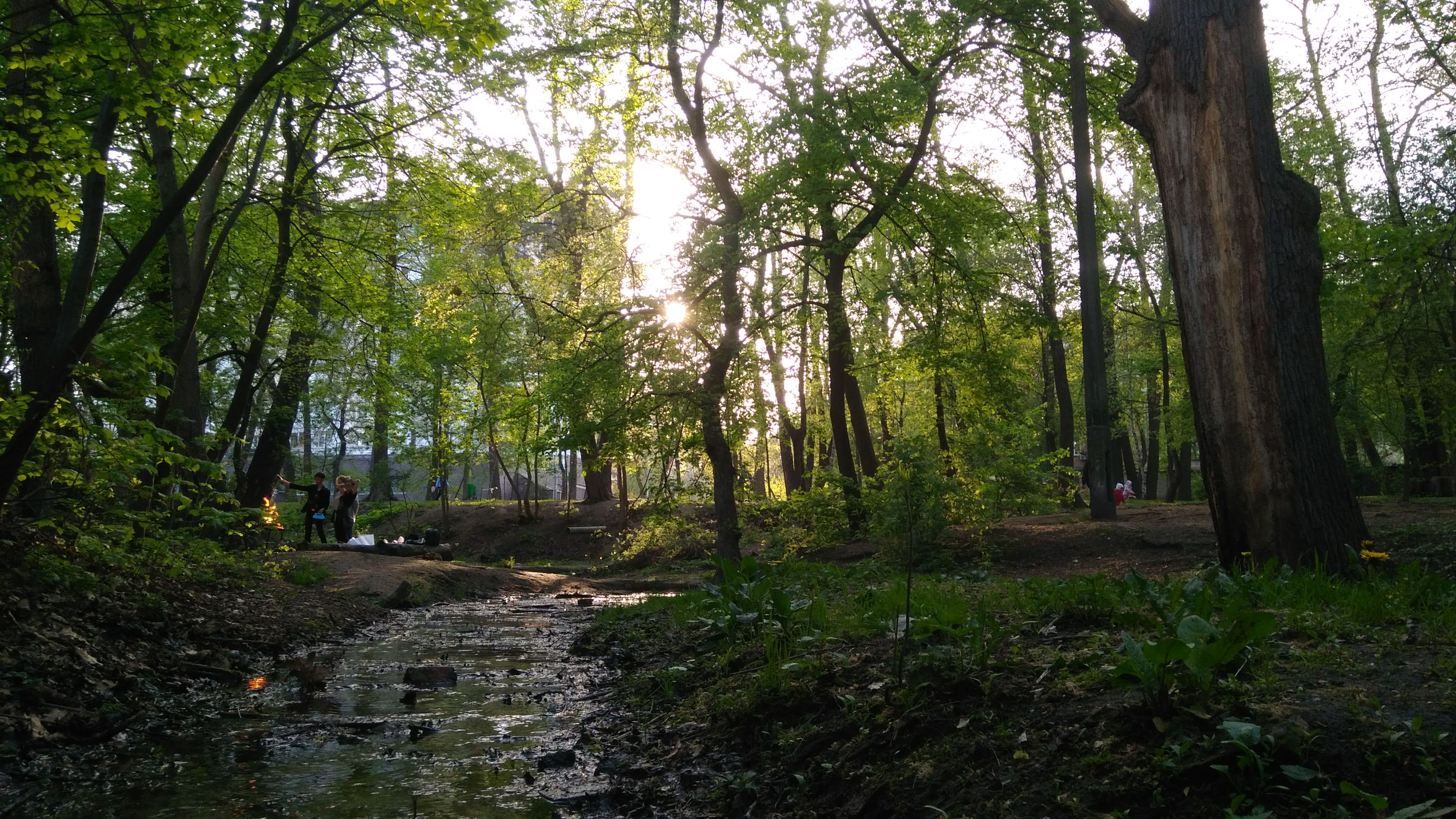 Річка Коноплянка в сквері Вітряні Гори